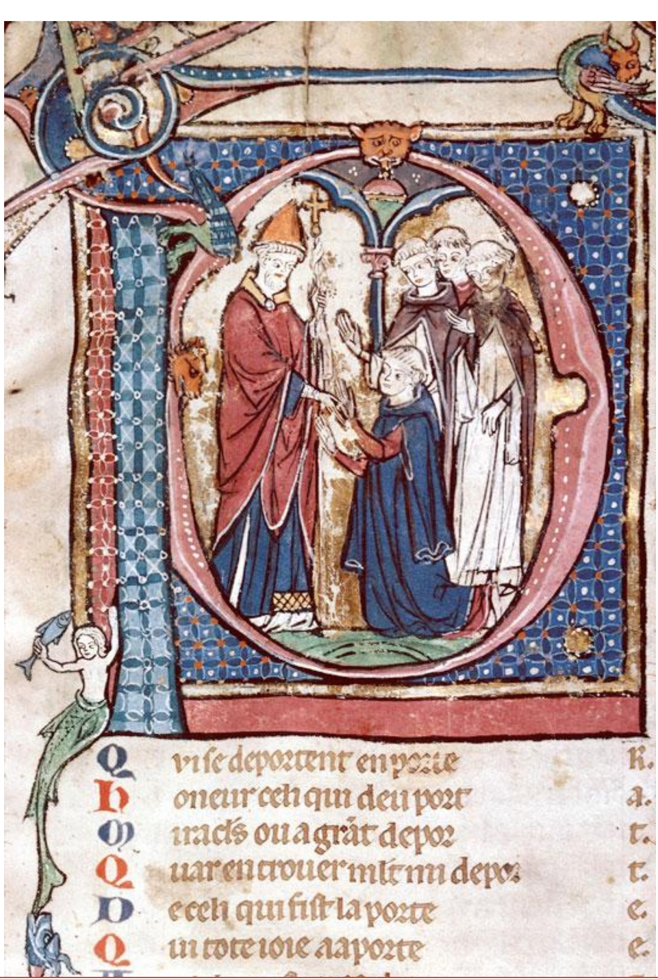 F002v-Chasse à la biche - Autruche